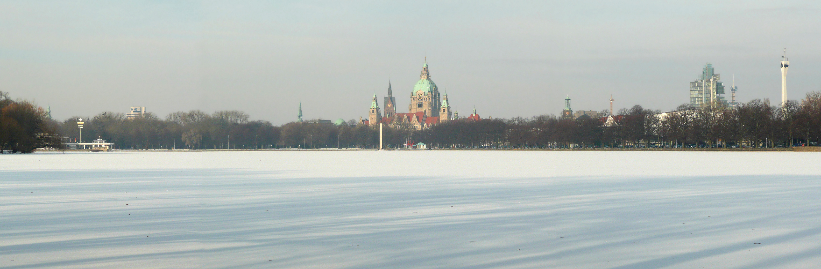 Maschseepanorama